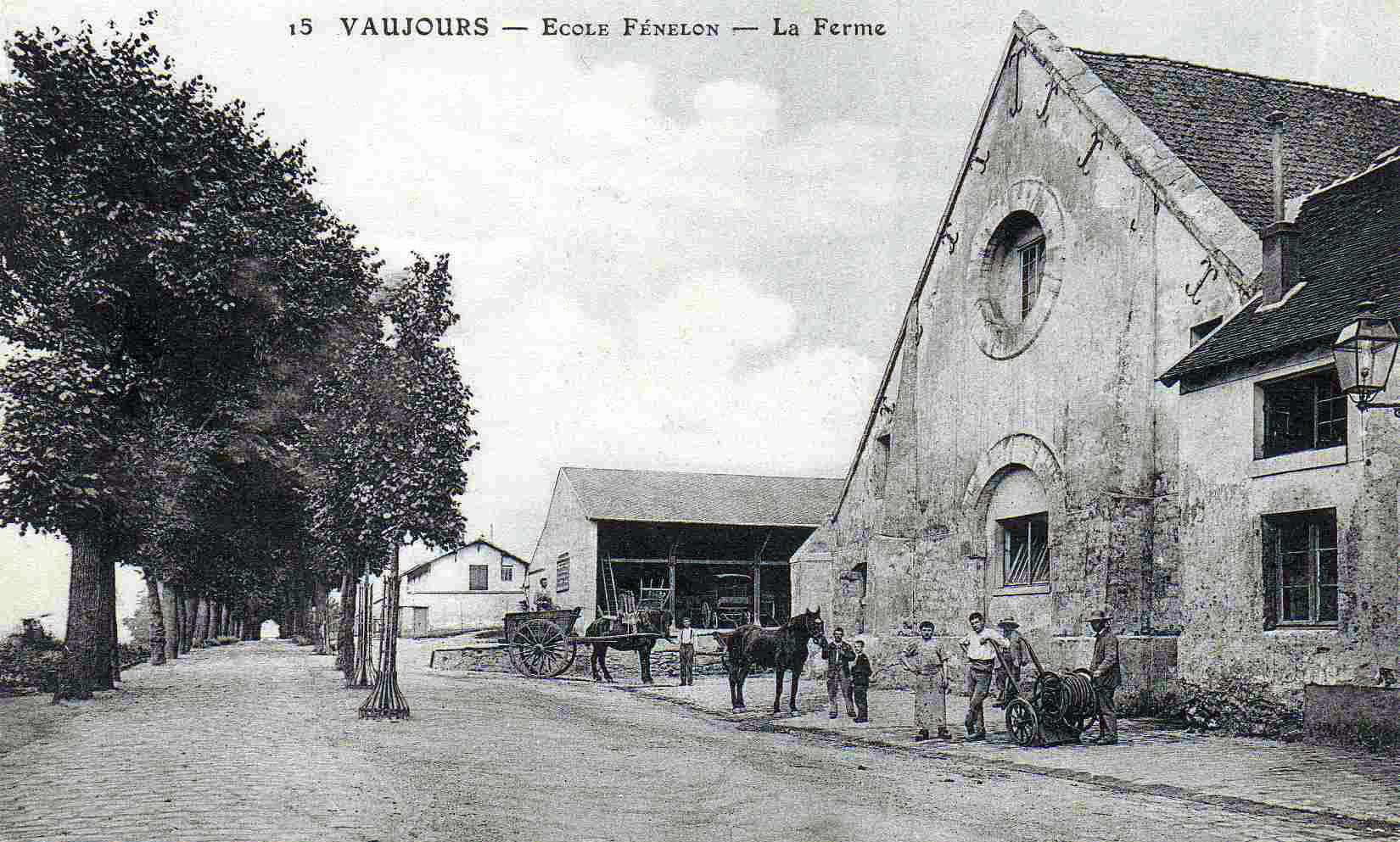 Vaujours (France) - Ecole Fénelon - La ferme vers 1900